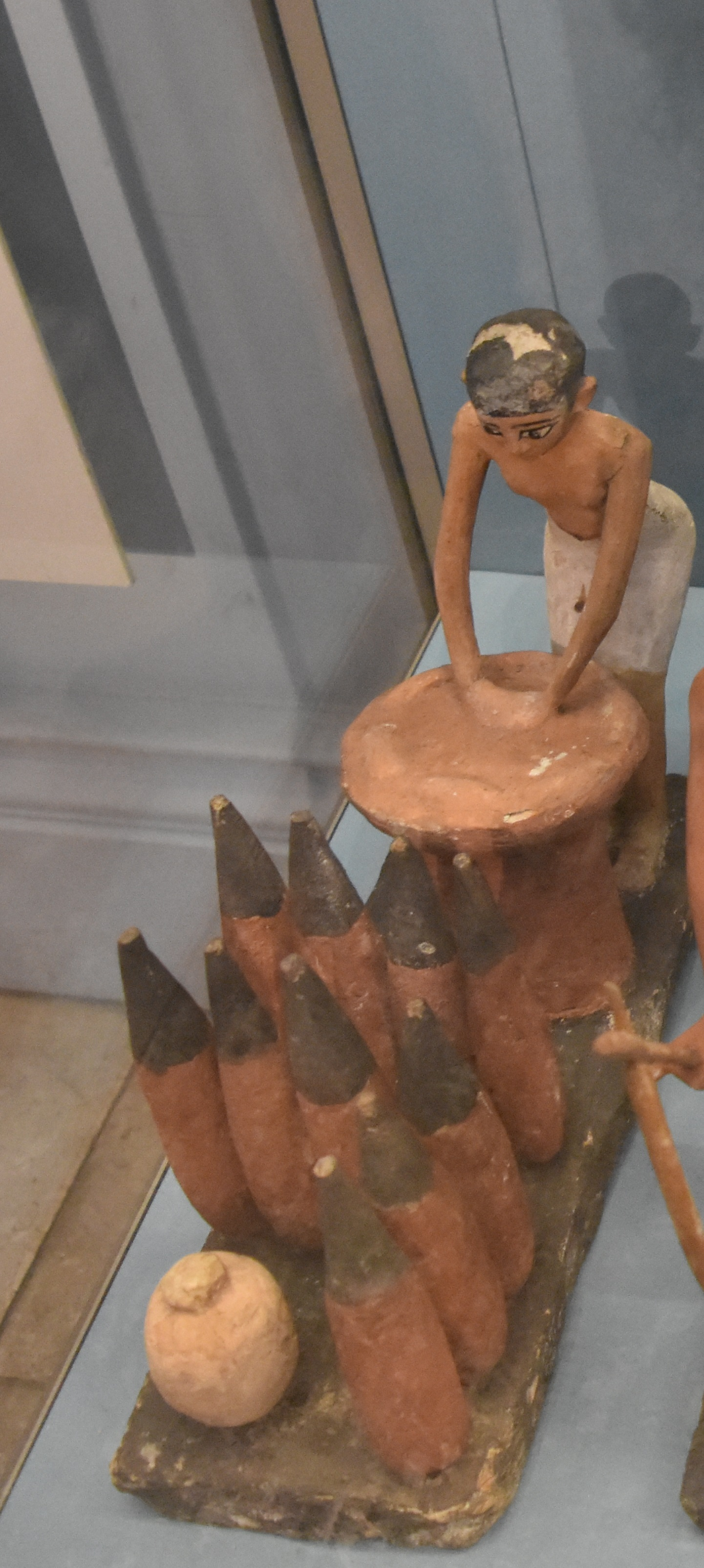 דמות אישה לשה בצק וקנקני בירה מלאים, המוזאון הבריטי, לונדון